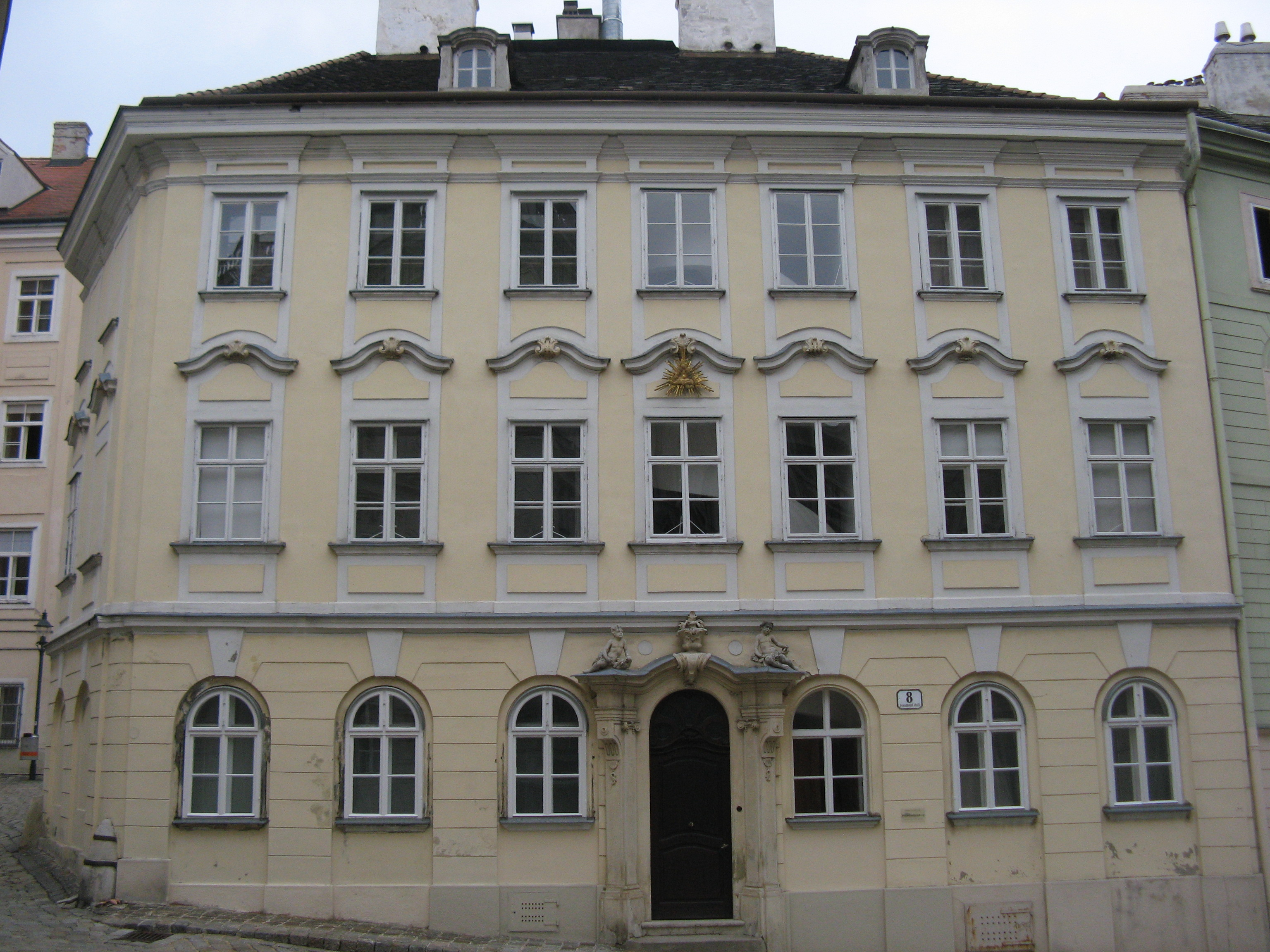 Haus Schreyvogelgasse 8 (3. Viertel 18. Jh.), Wien-Innere Stadt (other)